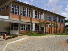 Faculdade Capixaba de Nova Venécia